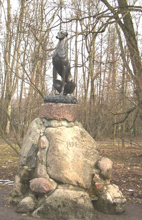 Помнік сабаку ў Нясьвіжскім парку